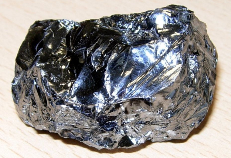 Silicio